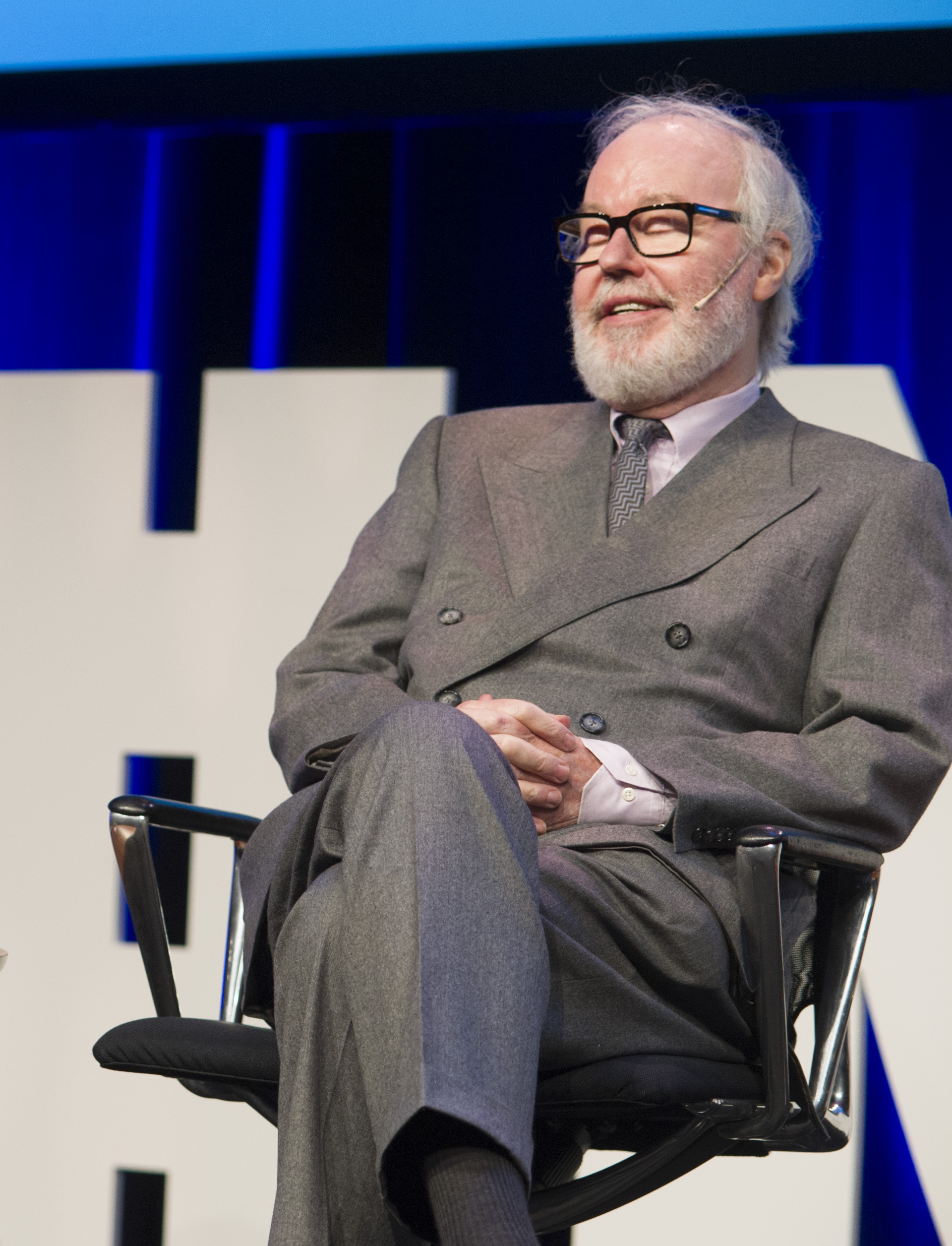 Nordiske Mediedager 2015